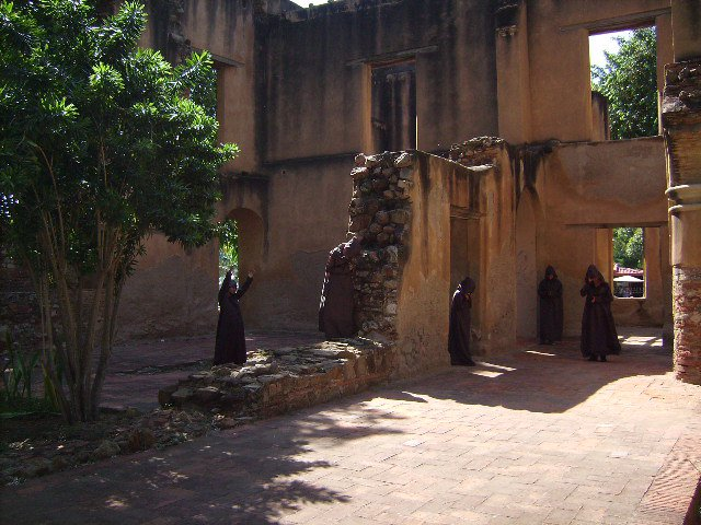 LA CASA FUERTE DE BARCELONA. LUGAR EN DONDE SE LLEVO LA MAS TRAGICA MATANZA DE PERSONAS.